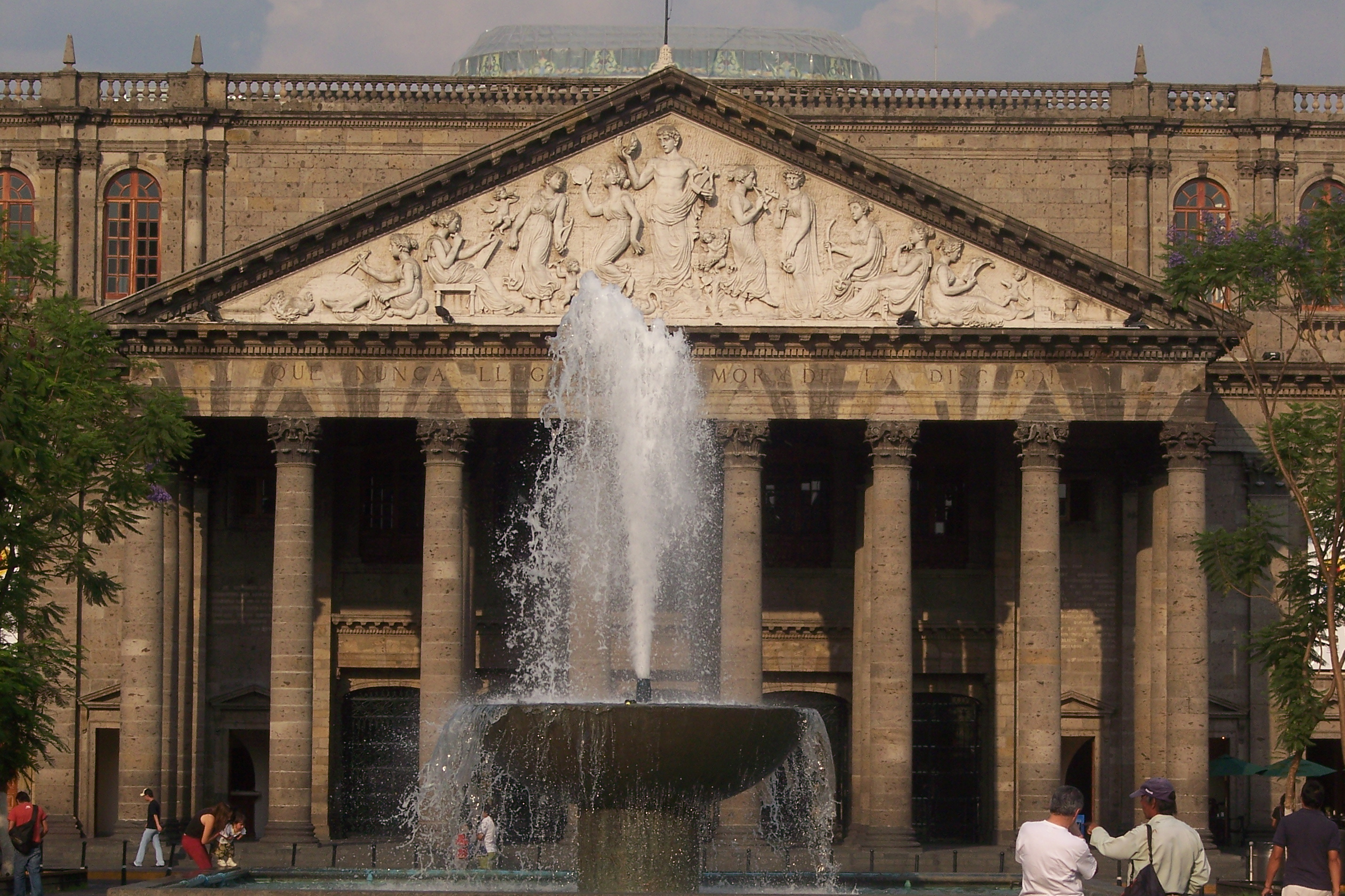 Teatro Degollado, de Guadalajara, Jalisco en México.